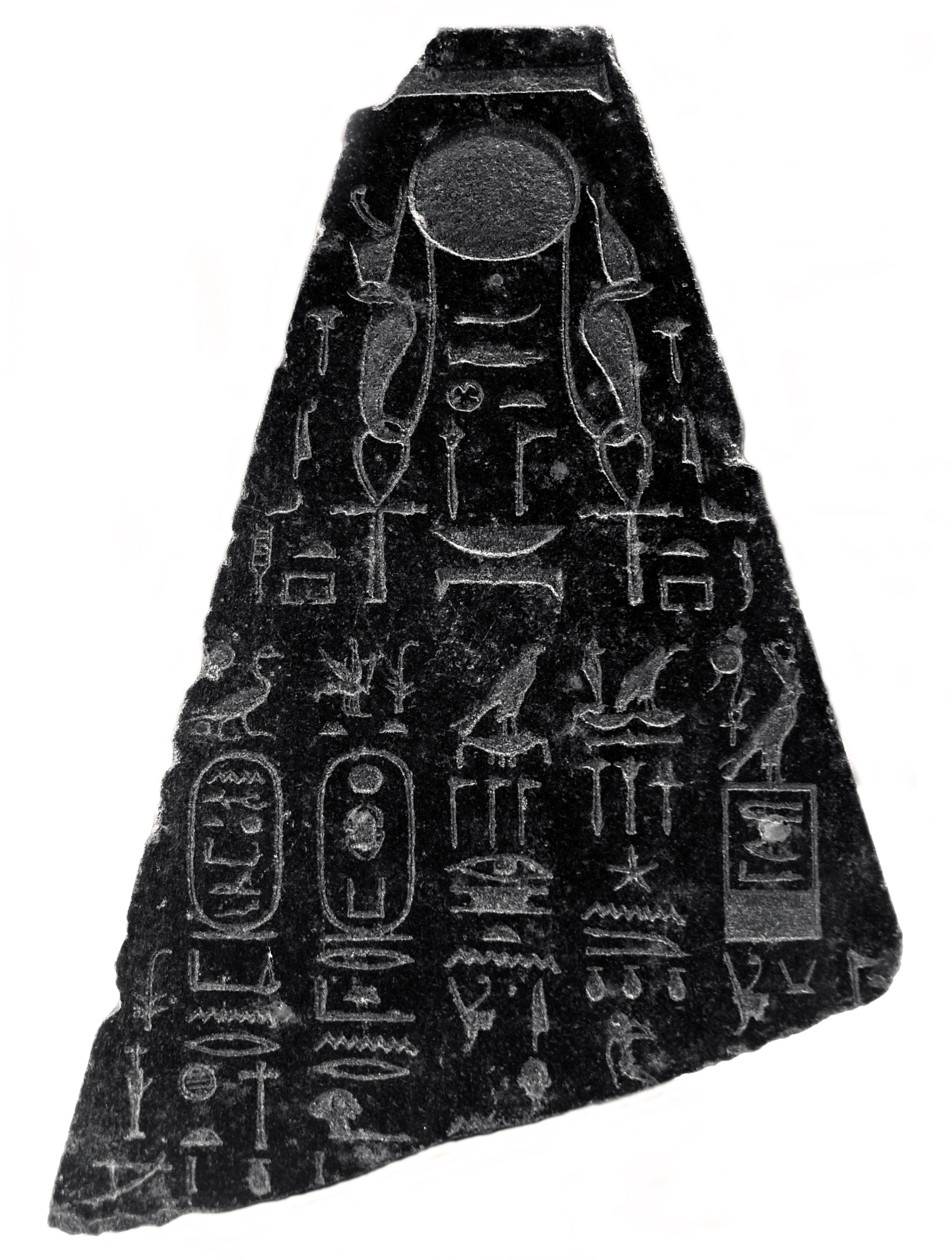 Les cinq noms du roi Nectanébo Ier Sommet de pilier dorsal d’une statue. La titulature complète d’un roi comprend cinq noms.